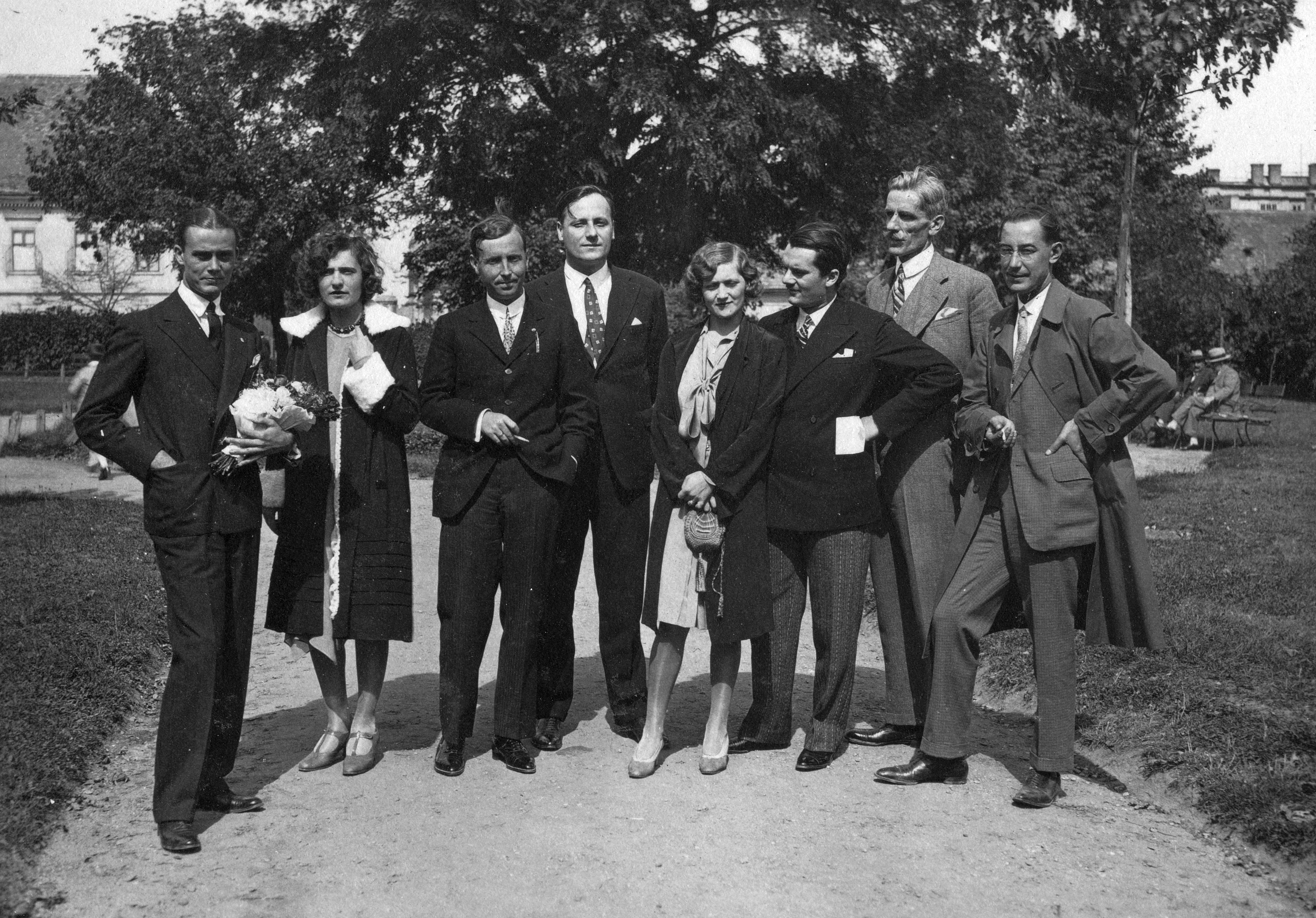 A győri rádiómatiné kapcsán készült kép. Weygand Tibor énekes, Hegedűsné Horváth Mária, vitéz Somogyváry Gyula író (Gyula diák), Hegedűs Tibor rendező, Polgárné Tóth Erzsi operaénekes, Polgár Tibor zeneszerző, Scherz Ede rádióbemondó